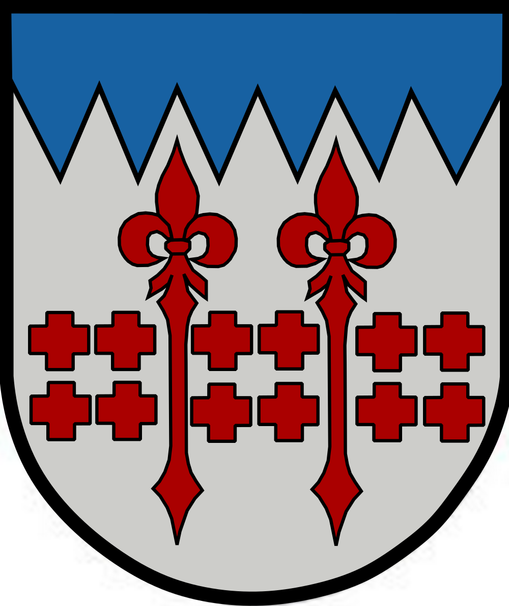 Gemeindewappen seit 1994: Das durch seine Farbkombination als äußerst freundlich zu bezeichnende Wappen dokumentiert durch seine Symbole in ausdruckvoller Weise die Geschichte und Besonderheit Gröbmings: Die jahrhundertelange rechtliche Sonderstellung als Hofmark wird durch die beiden Lilienstäbe als Zeichen der Rechtsgewalt dargestellt, der Zahnschnitt in Silber dokumentiert die slawische Sprachwurzel "greben" und weist auf unser Gebirge "Kamm" hin und die zwölf Apostelkreuze als Symbol für den als Kulturgut zu bezeichnenden Apostelaltar in der katholischen Kirche geben Zeugnis der besonderen christlichen Verbindung.